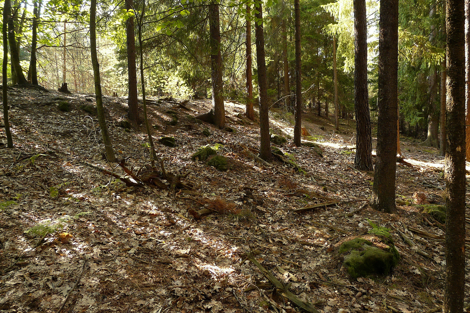 Kozí hřbet